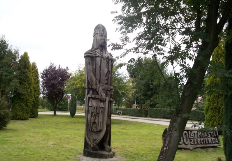 Pomnika Wojaka w Złociencu